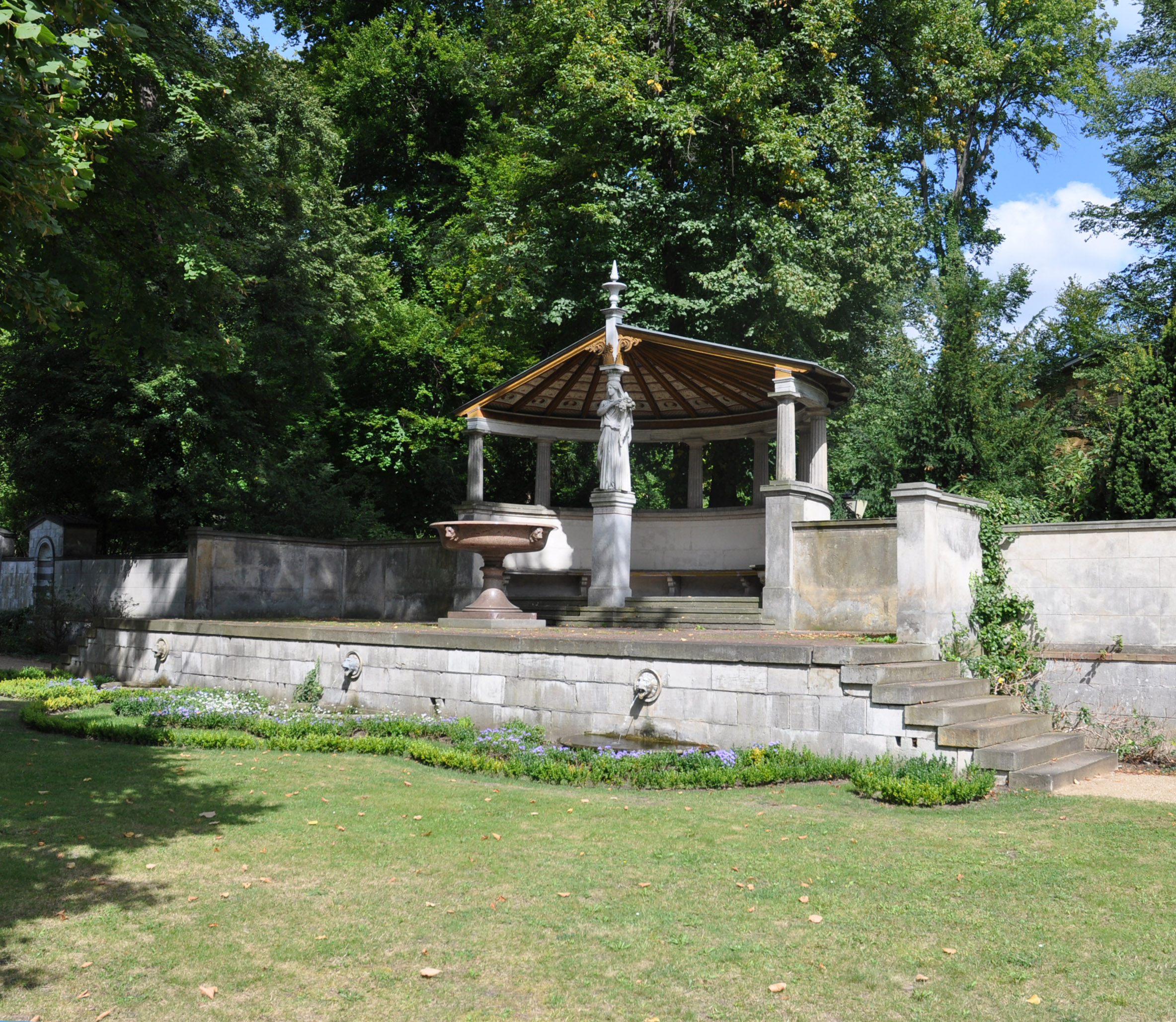 Das Stibadium von Südwest